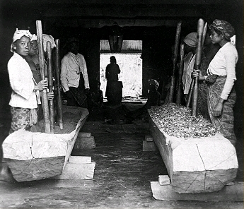 Arbeiders op Java die de bladeren van de op de plantages geoogste cocaplanten in een loods fijnstampen. Dit produkt werd veelal verhandeld in Amsterdam; de Nederlandsche Cocaïnefabriek kon het verder verwerken tot cocaïne.